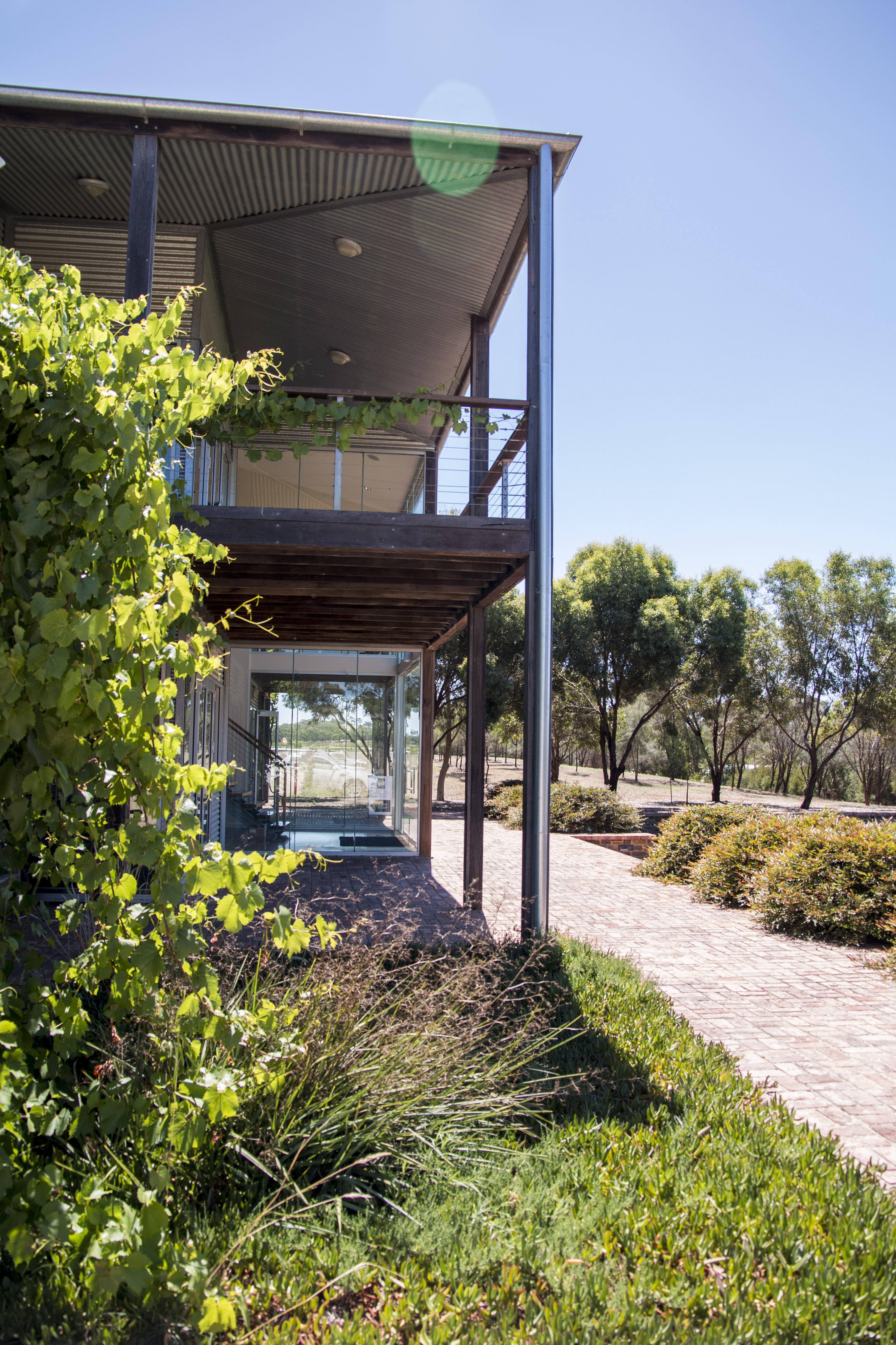 Torbreck Office Vignoble de la Barossa Valley